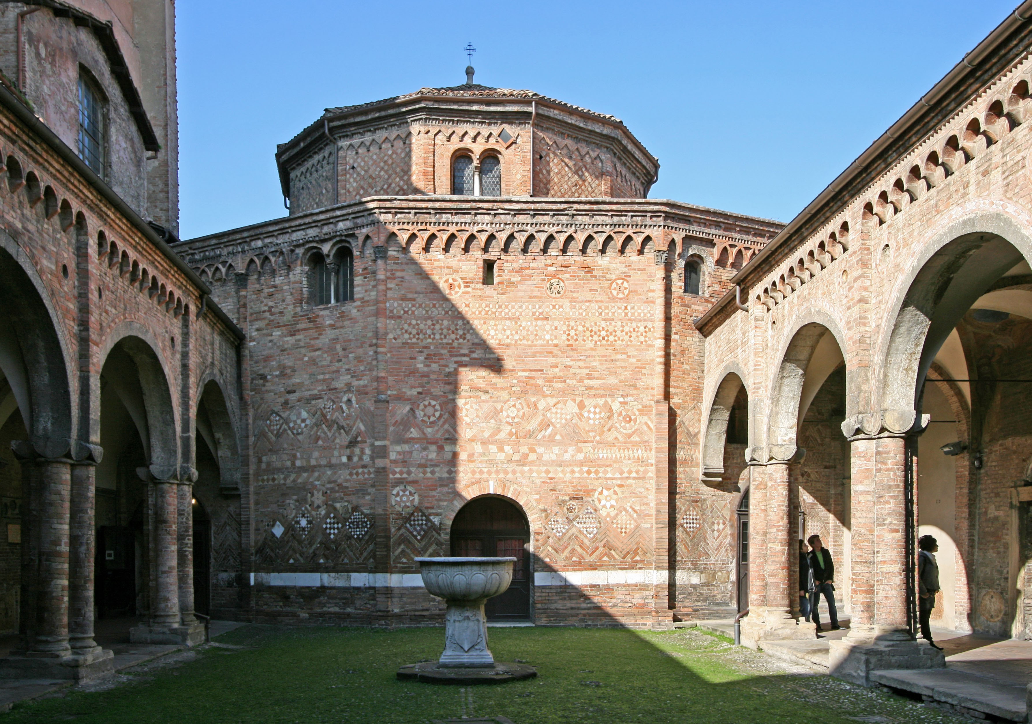 Sancta Jerusalem di Bologna. Quarta Chiesa: S. Sepolcro, vista dal Cortile di Pilato.